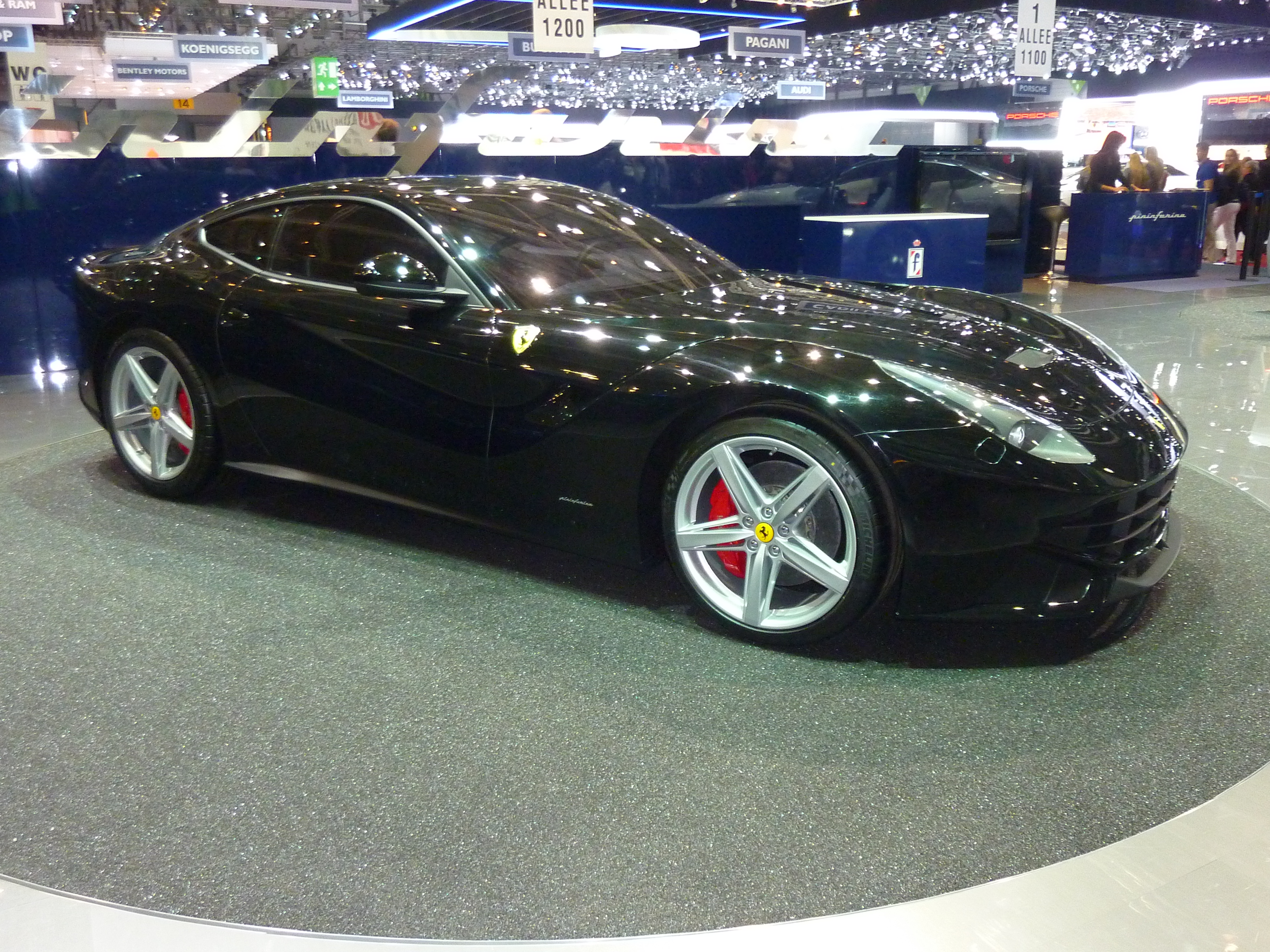 Ferrari F12 berlinetta